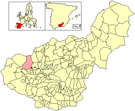 Situación de la localidad de Escóznar (en el municipio de Íllora) respecto a la provincia de Granada, en España.